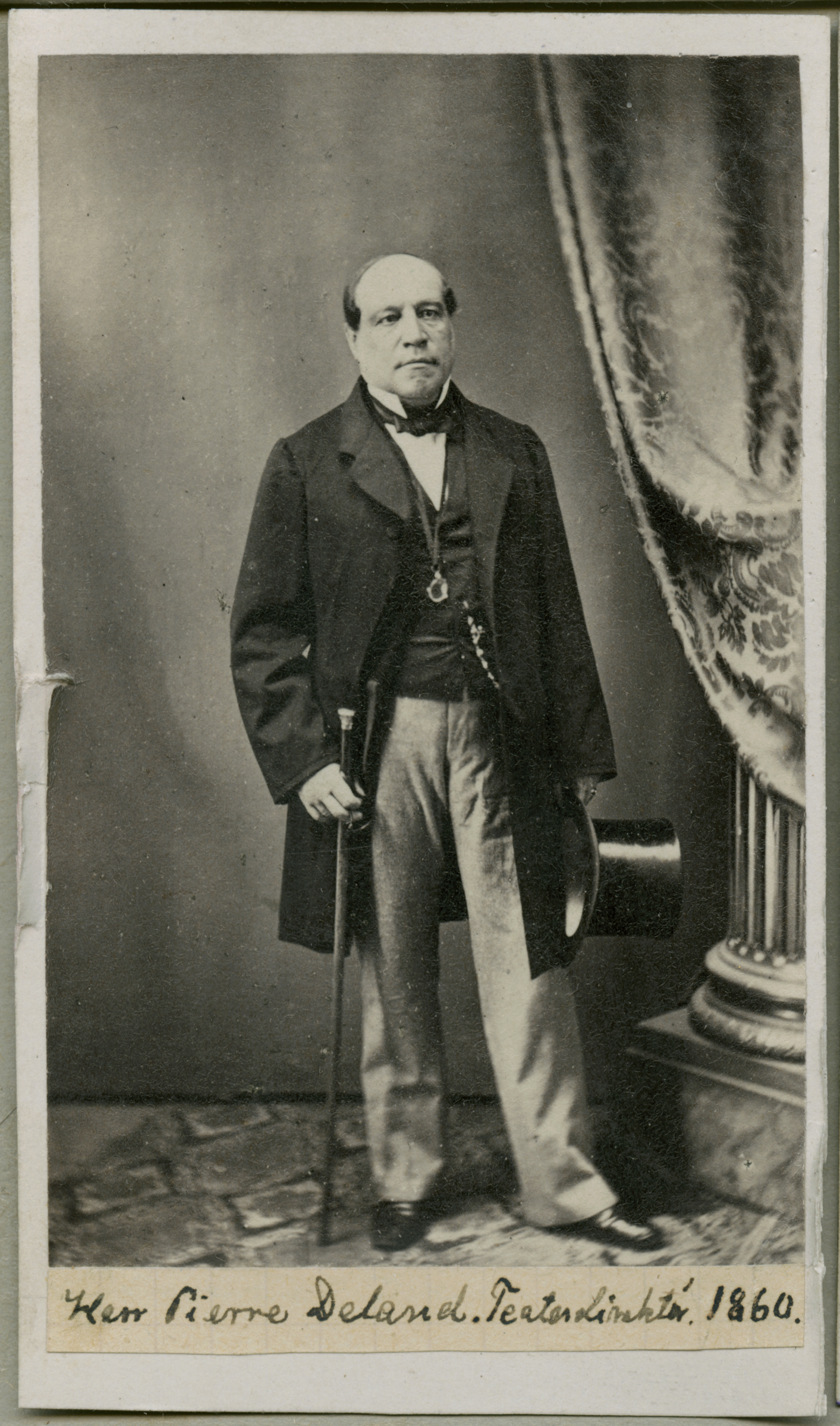 Pierre Deland (1805-1862)